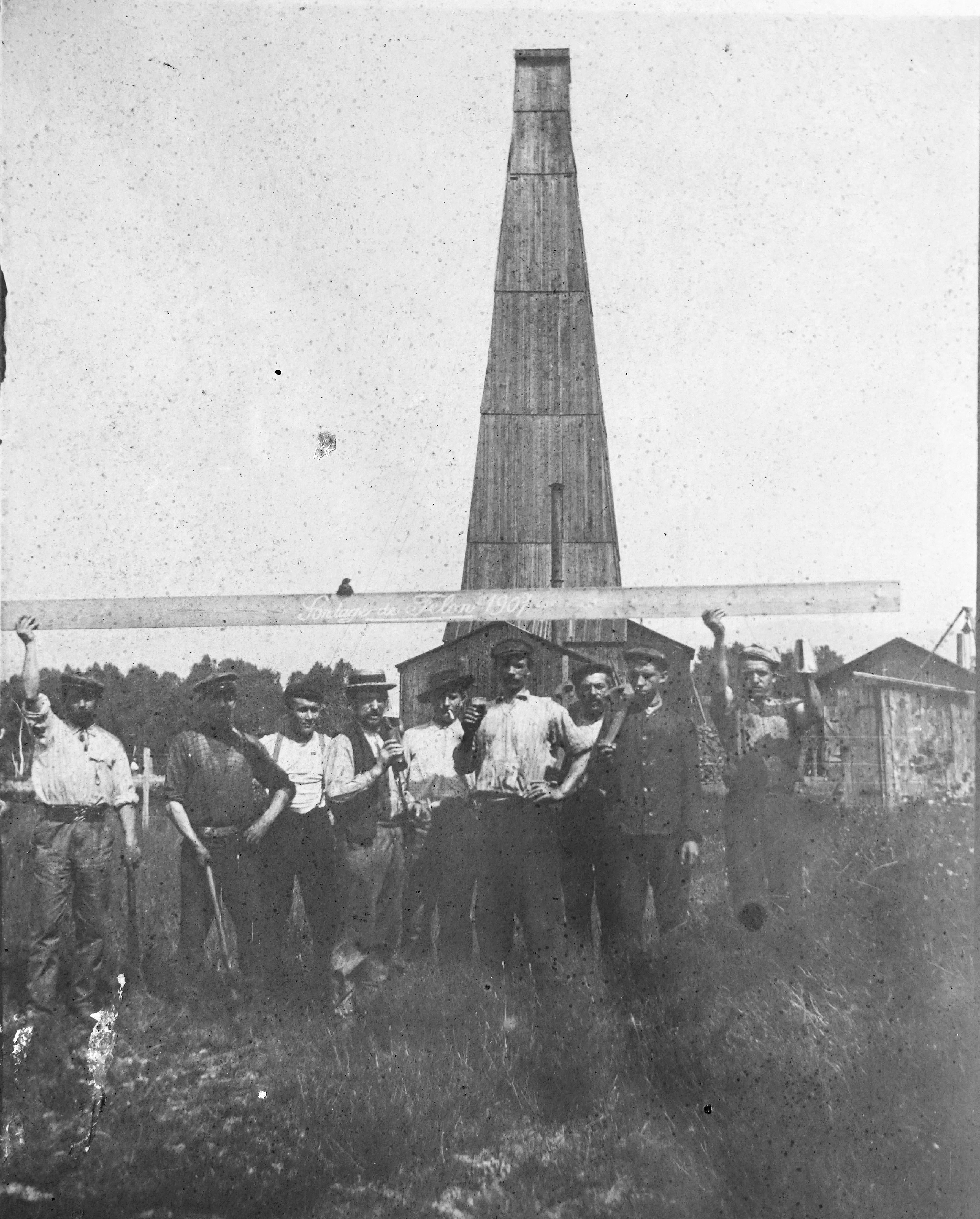 La tour de sondage de Felon et les ouvriers.